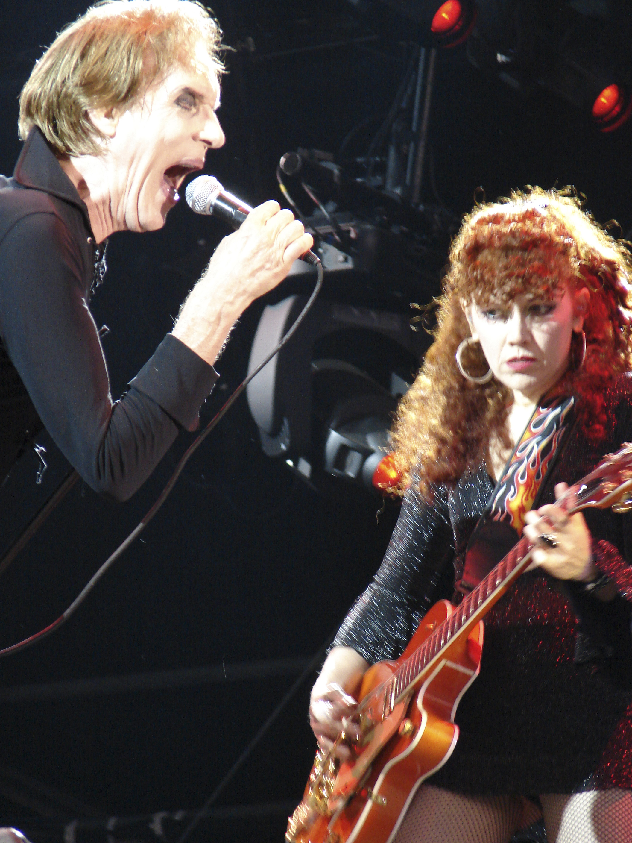 Lokeren, Belgium 9/8/2006